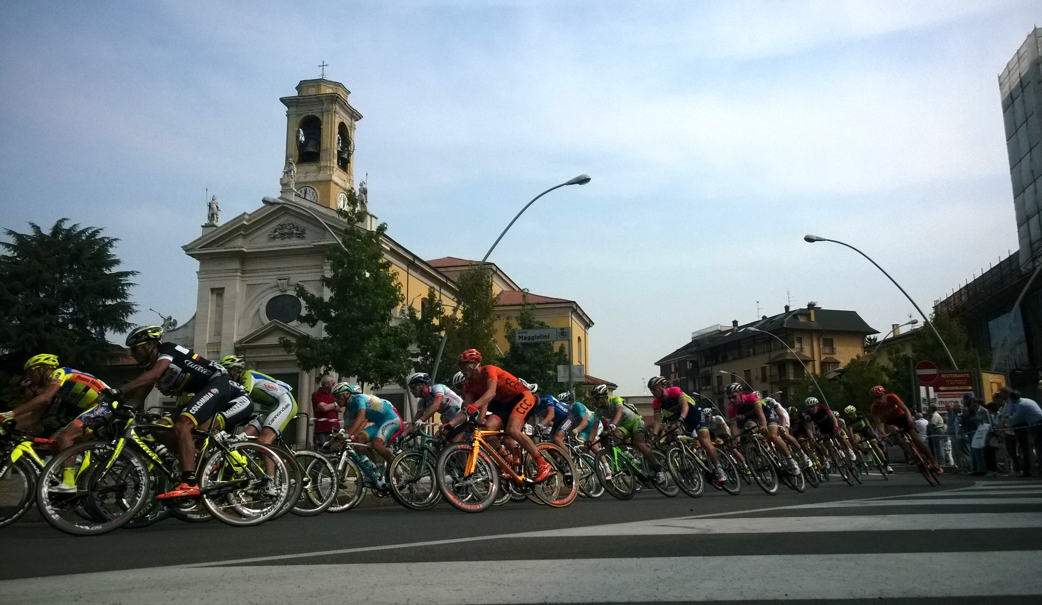 Coppa Bernocchi davanti alla Chiesa dei SS. Gervaso e Protaso e piazza Maggiolini This is a photo of a monument which is part of cultural heritage of Italy.